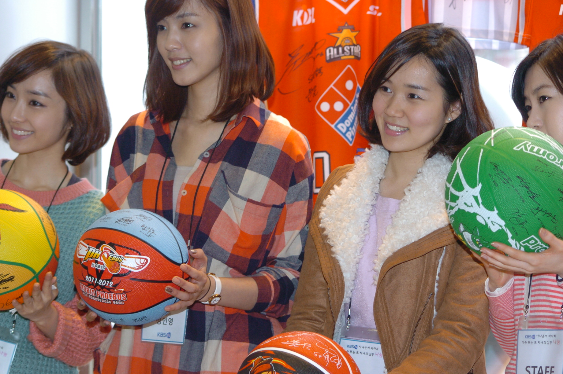 KBSN 아나운서 바자회